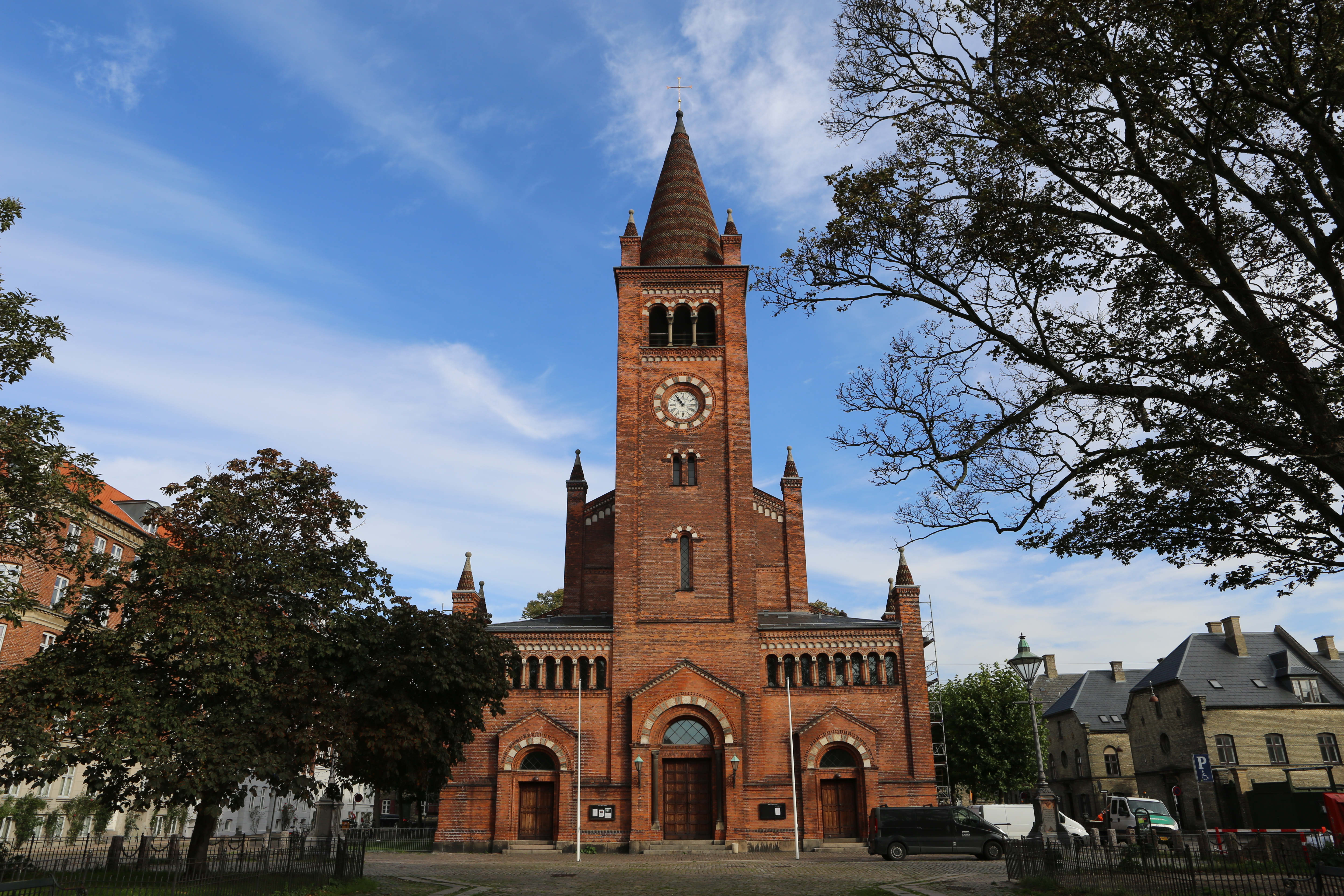 St. Pauls Church in Copenhagen, Denmark